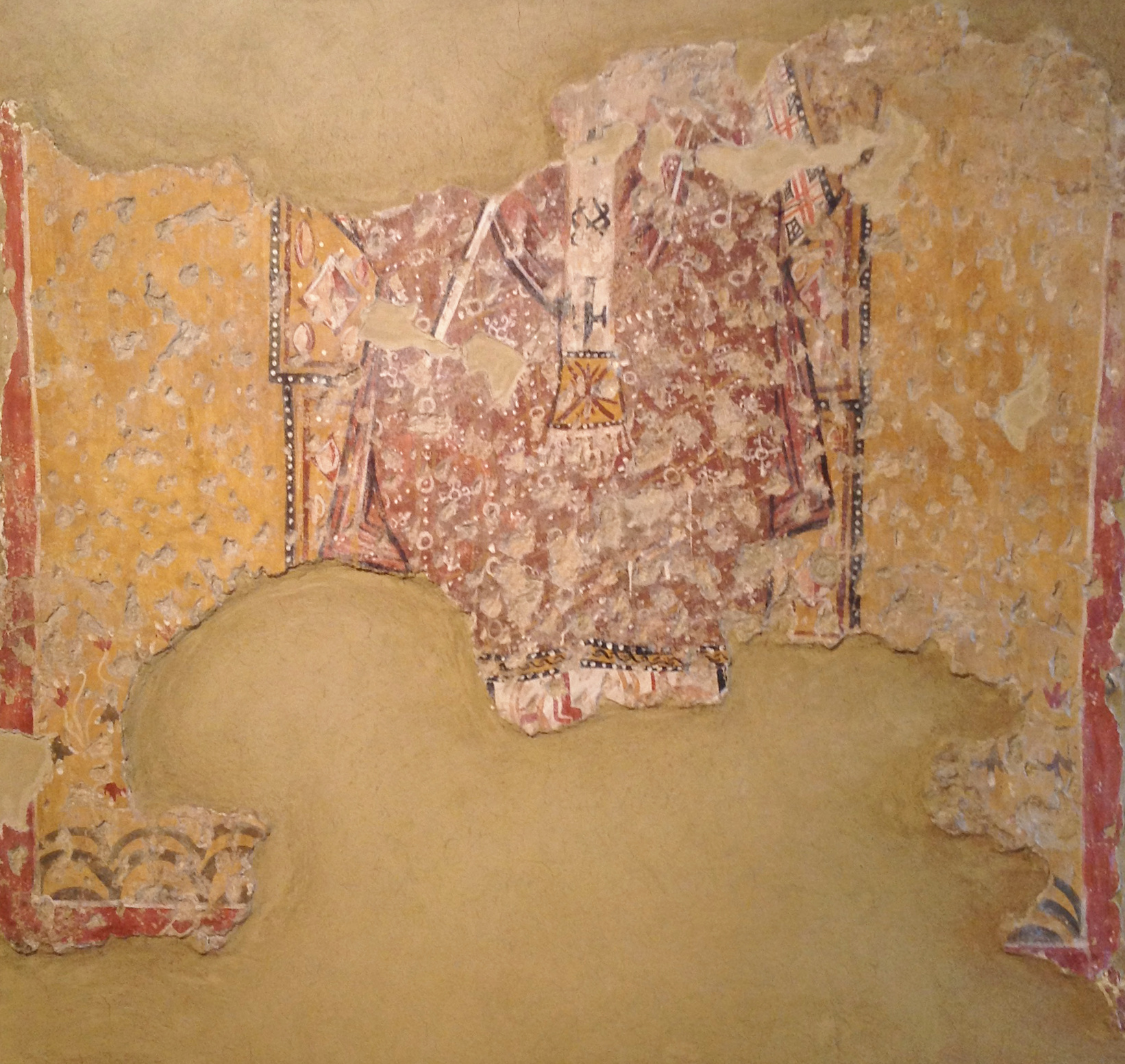 Affresco proveniente dall'ex chiesa di Santa Lucia in Gaeta.